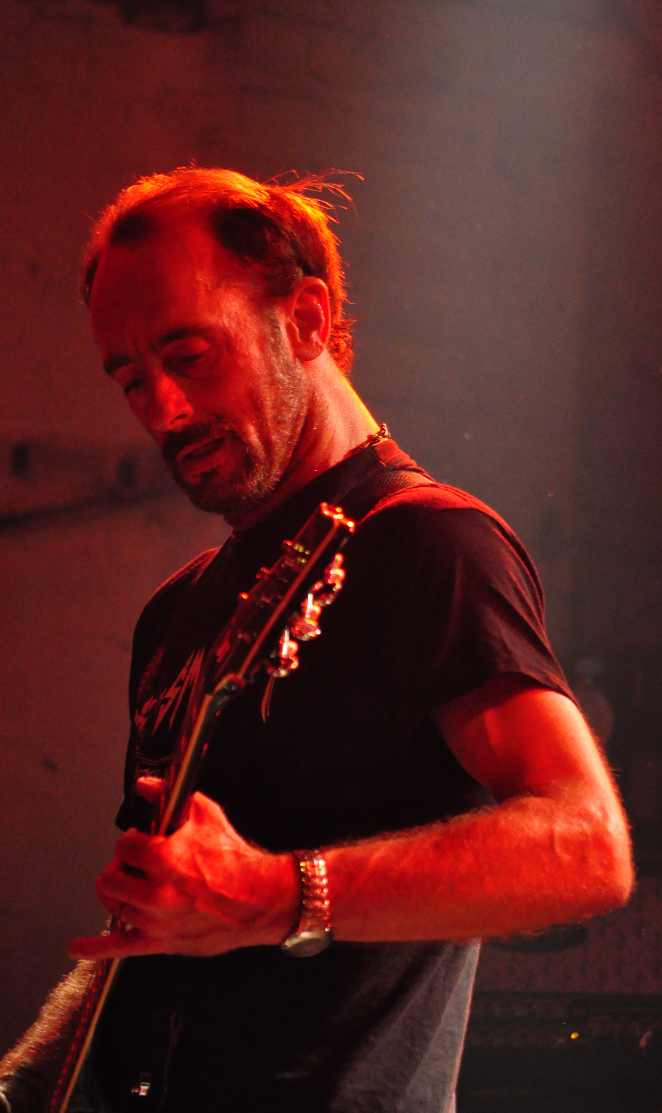 Rick Hunolt, Exodus_1